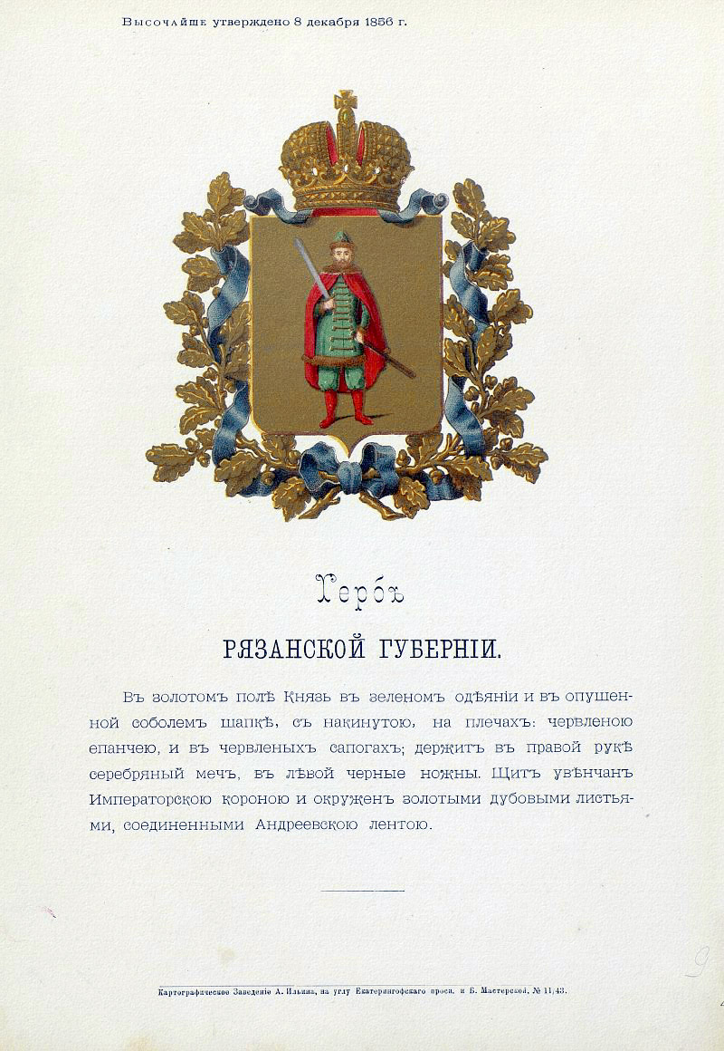 Official Russian Empire coat of arms Ryazan Governorate. Герб Российской Империи Рязанской губернии с официальным описанием в Гербовнике Бенке. Утверждён Императором Всероссийским Александром Вторым.